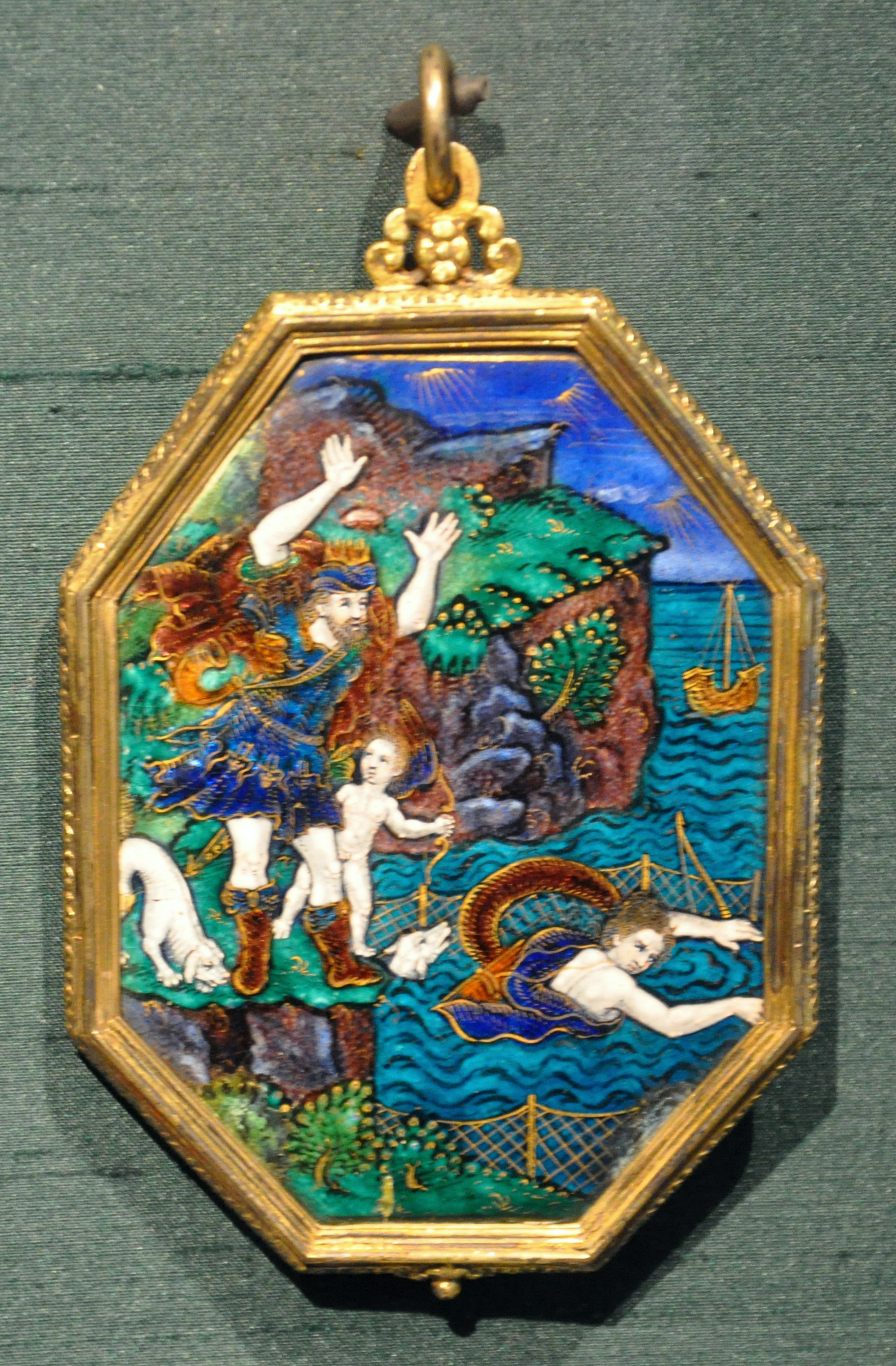 Suzanne de Court (?): Spiegelrückseite „Minos und Britomartis“, Limoges um 1600; Kupfer, Maleremail, Goldstrichelung. Kupferrahmen, vergoldet. Museum für Angewandte Kunst Frankfurt am Main, Inv. Nr. WMH 8.